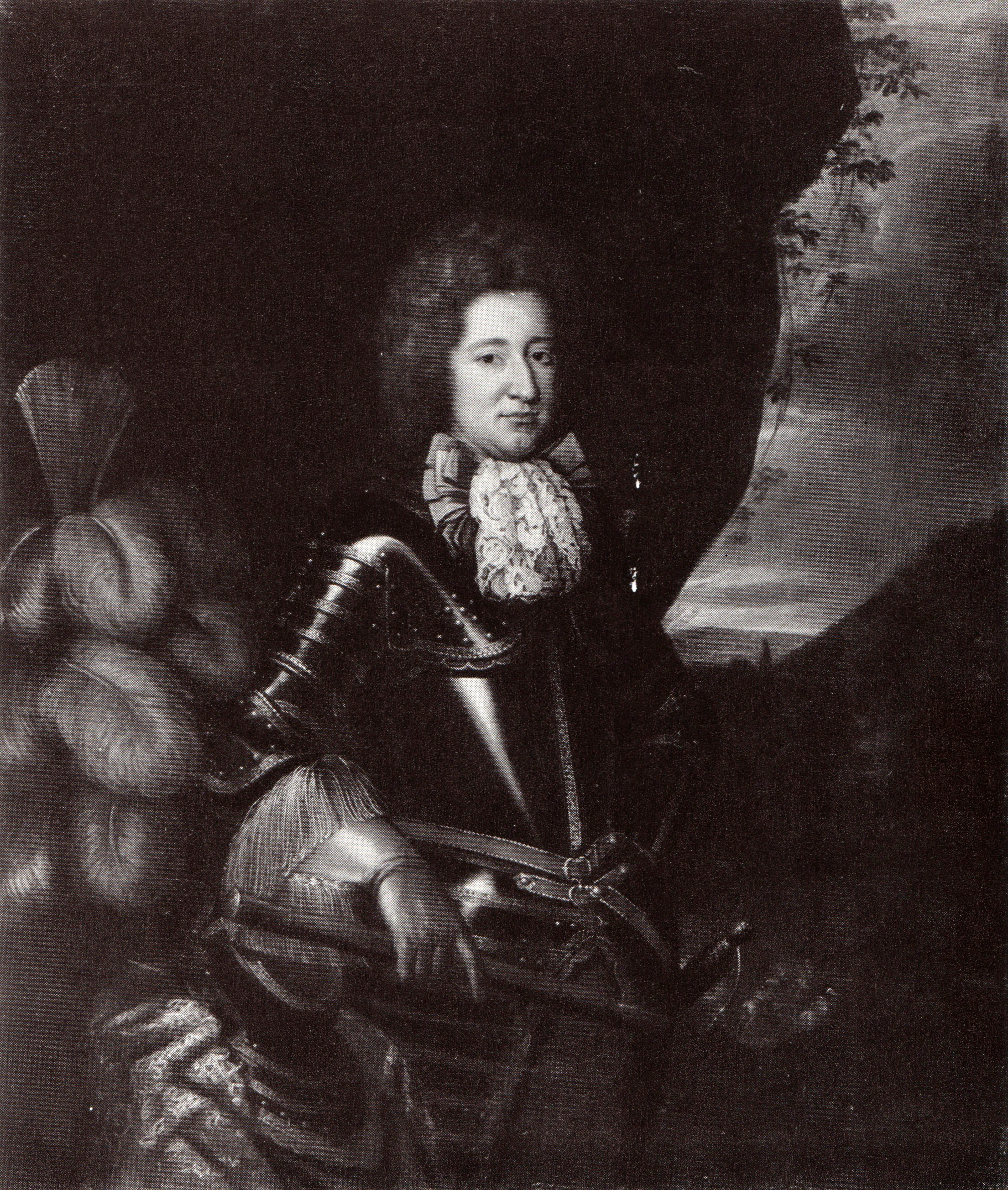 Markgraf Ludwig von Brandenburg